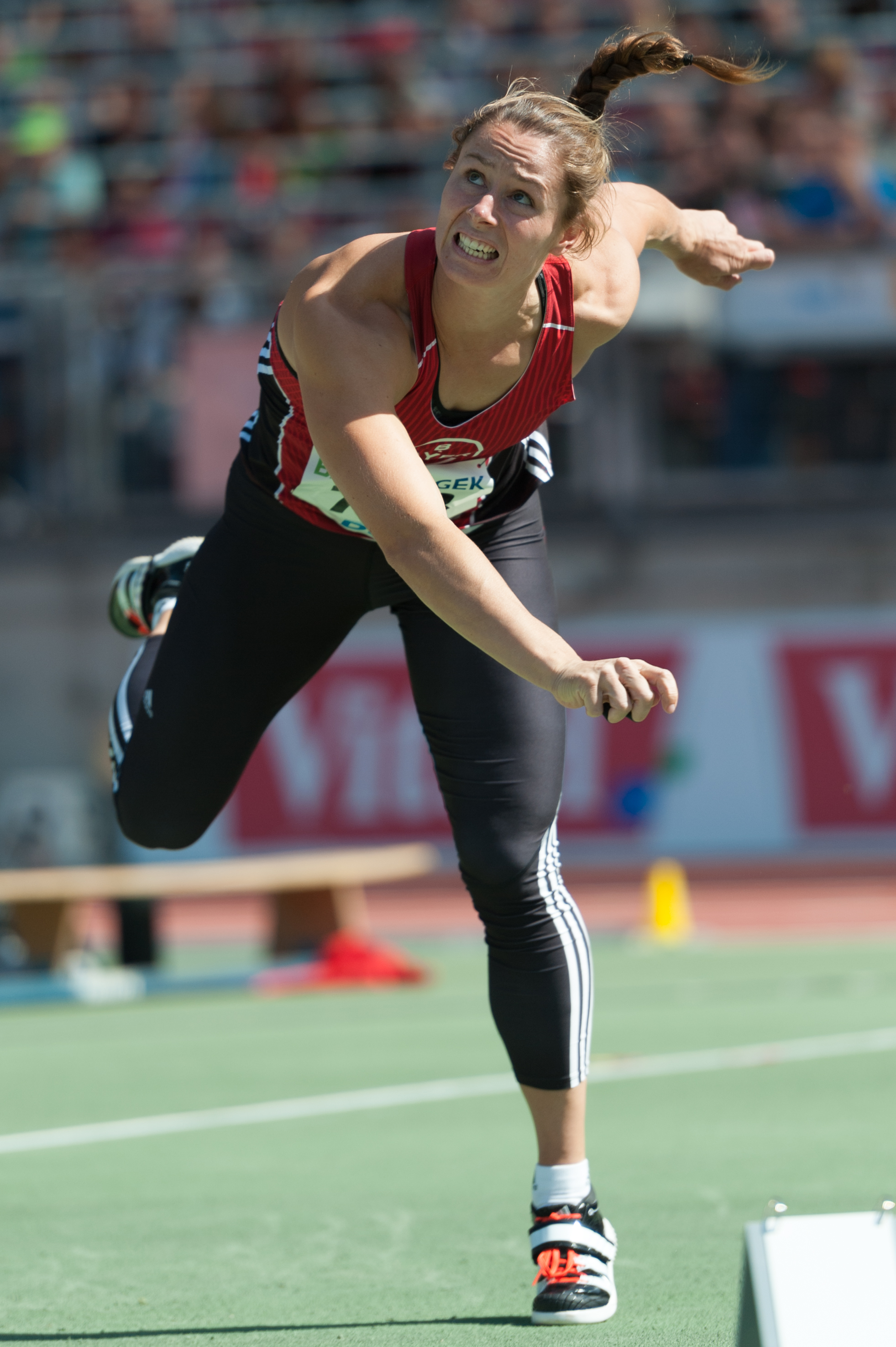 Deutsche Leichtathletik-Meisterschaften 2015: Frauen Speerwurf - Katharina Molitor, TSV Bayer 04 Leverkusen